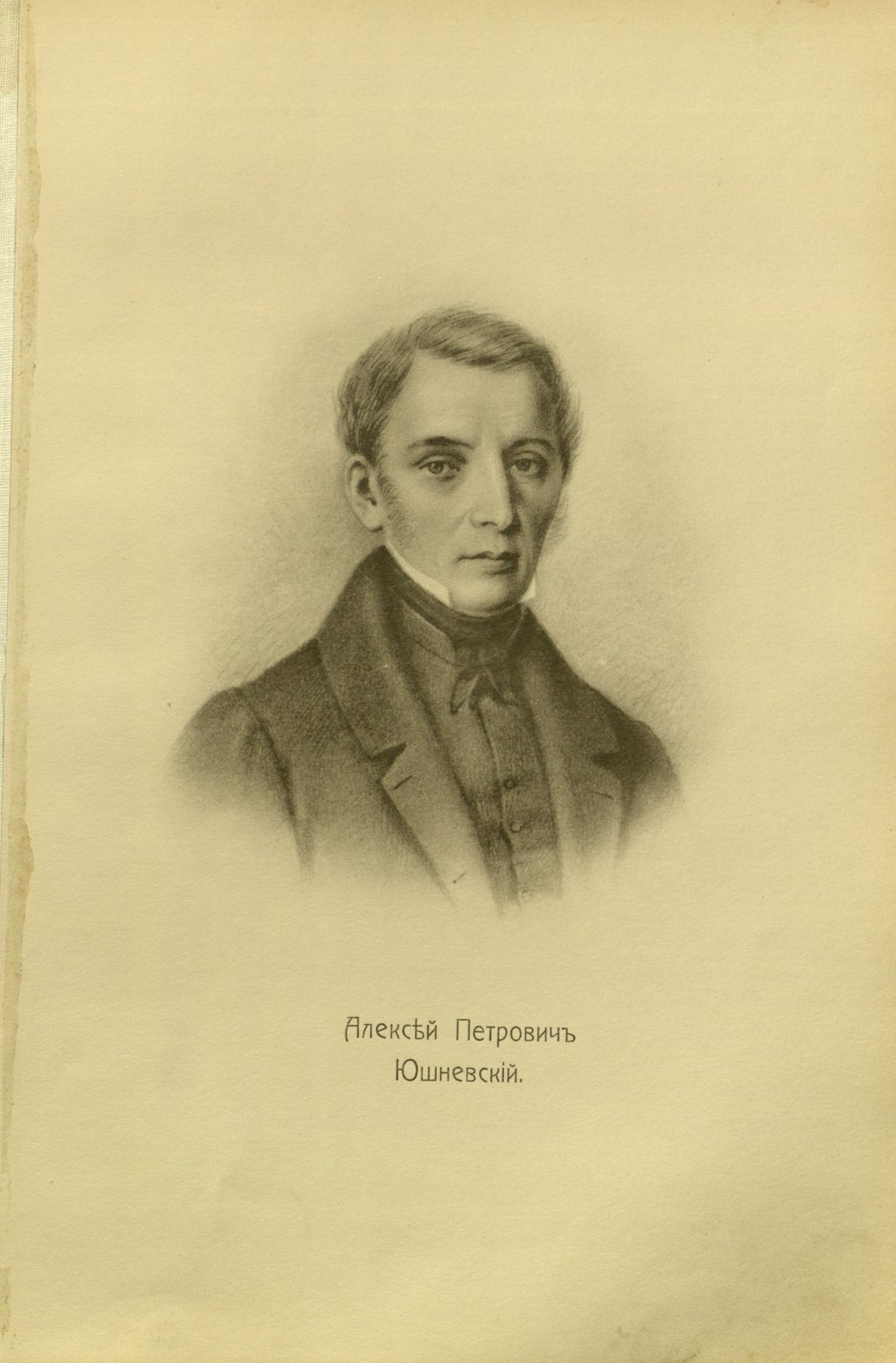 Юшневский, Александр Петрович